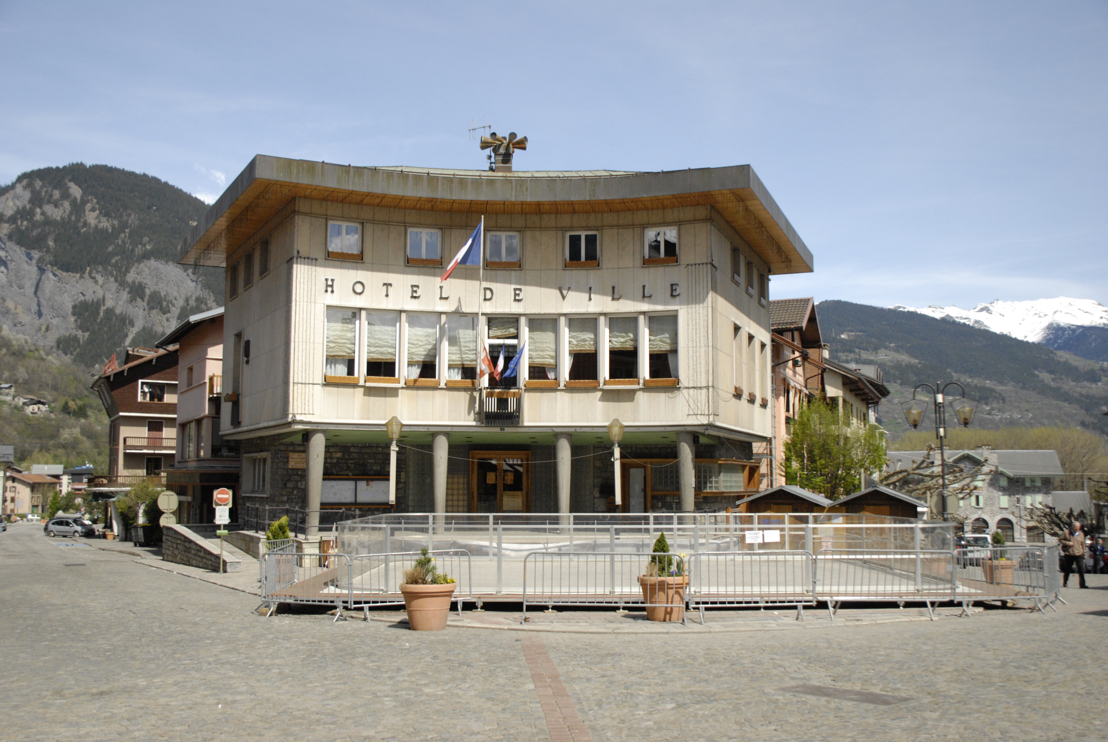 Hotel de ville de Bourg-Saint-Maurice (France)